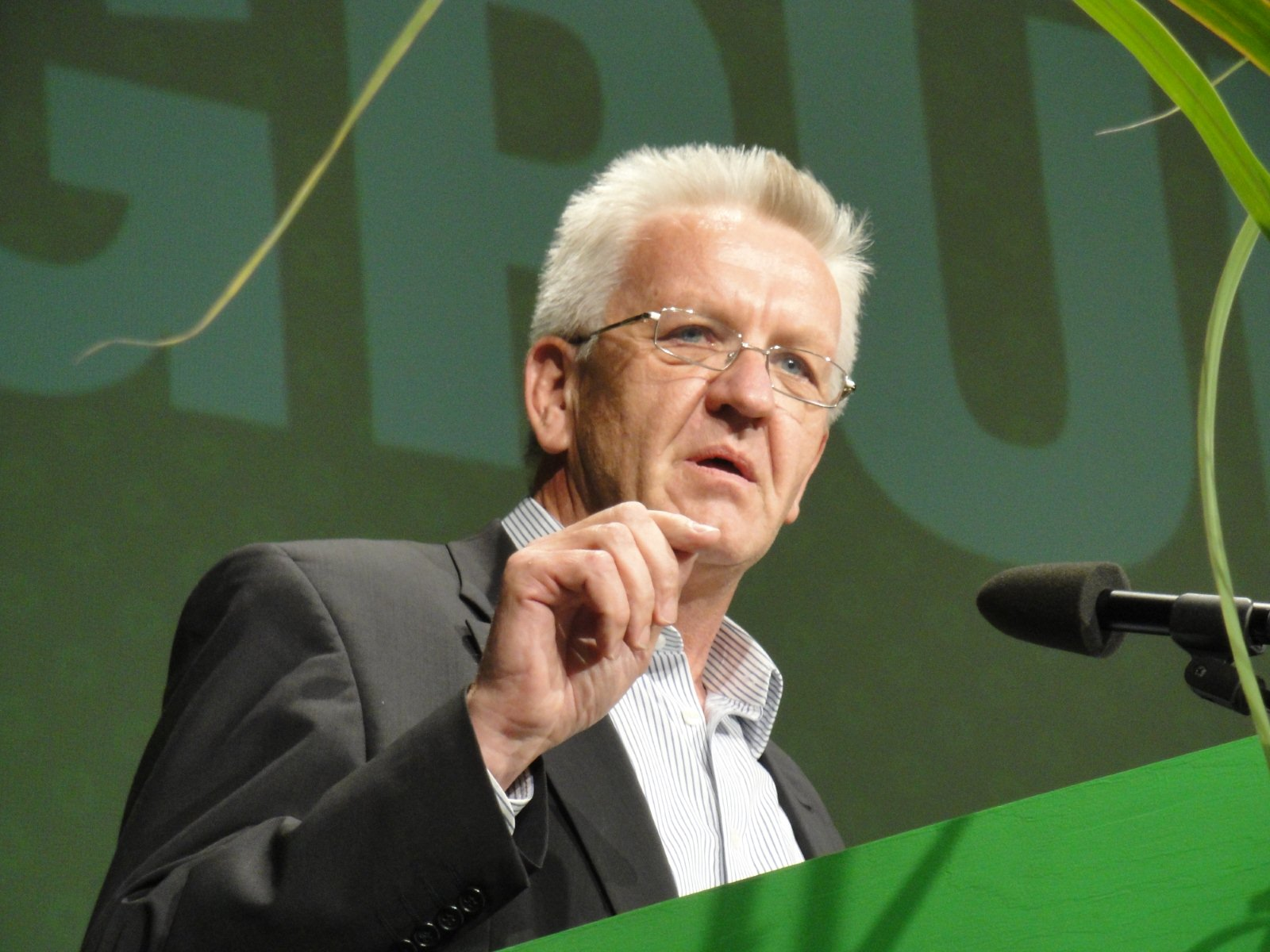 Winfried Kretschmann (* 17. Mai 1948 in Spaichingen) ist baden-württembergischer Politiker der Grünen. Im Landtag vertritt er den Wahlkreis Nürtingen und war Spitzenkandidat der Grünen für die Landtagswahl 2006.